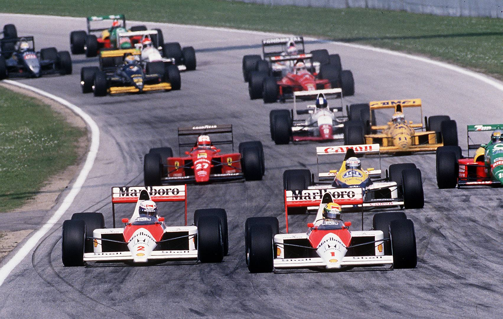 Ayrton Senna (n. 1) sorpassa il compagno di scuderia alla McLaren, Alain Prost (n. 2), alla curva Tosa del circuito di Imola, alla ripartenza del Gran Premio di San Marino 1989 di Formula 1. Il brasiliano effettuò ugualmente la manovra sul francese nonostante i due avessero in precedenza convenuto, ai box, di non attaccare colui che alla prima tornata fosse entrato in testa in quella curva: la rottura del patto scatenò la cosiddetta "guerra della Tosa", dando il là definitivo all'accesa rivalità Prost-Senna. Licensing 1989 1989 Imola, 1989